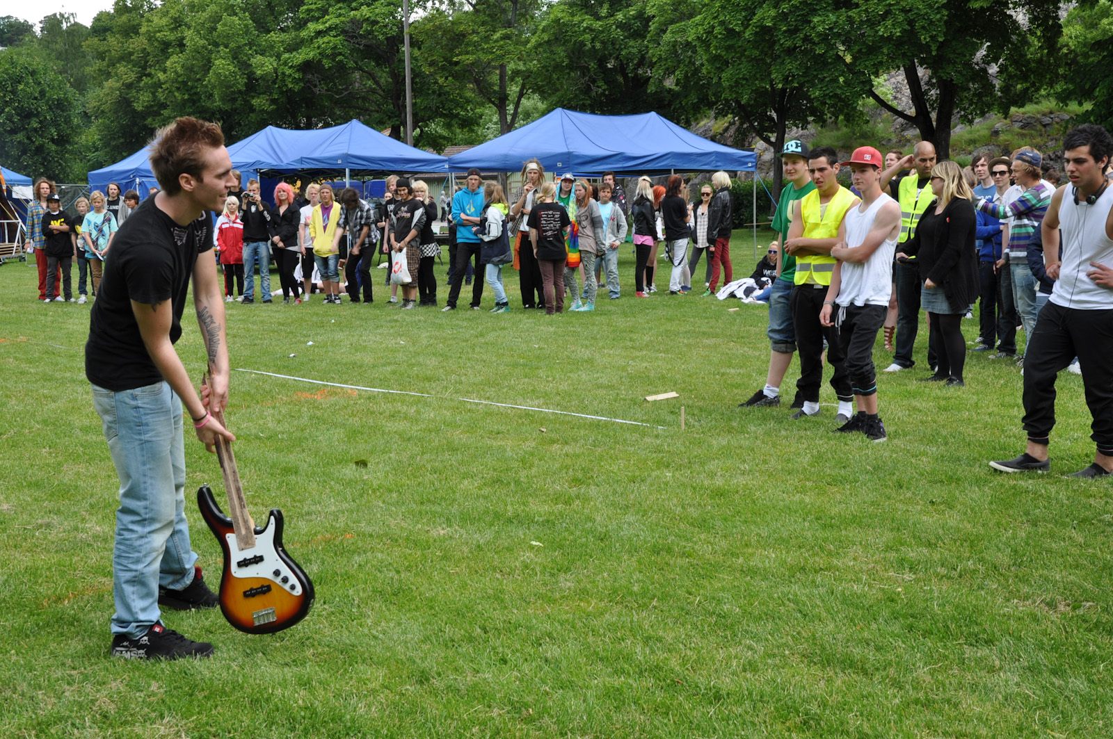 Gitarpælming under Spill og Grill 2010